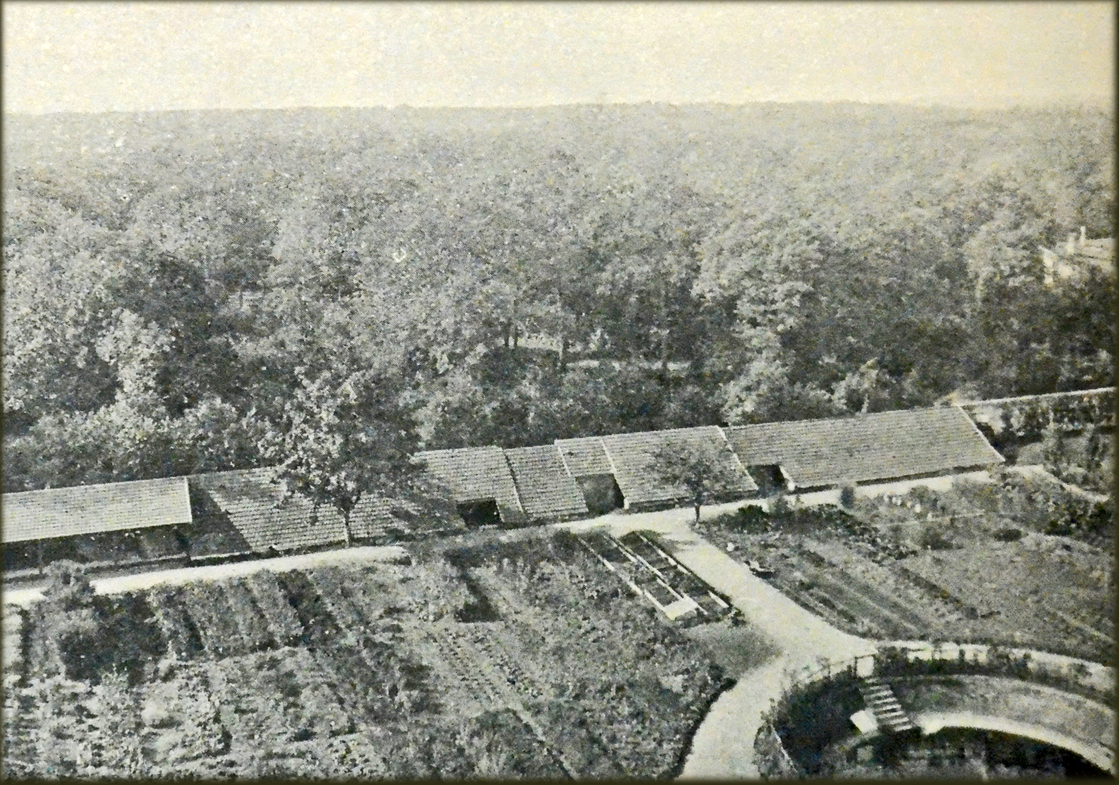 Photo légendée "Vue générale du champ d'expériences de Meudon "Photo ancienne, extraite d'un article de la revue française "Revue illustrée" (Tome relié 1902), portant sur Pierre Eugène Marcellin Berthelot, né le 25 octobre 1827 à Paris et mort le 18 mars 1907, Cliché : Valérian Gribayedoff.